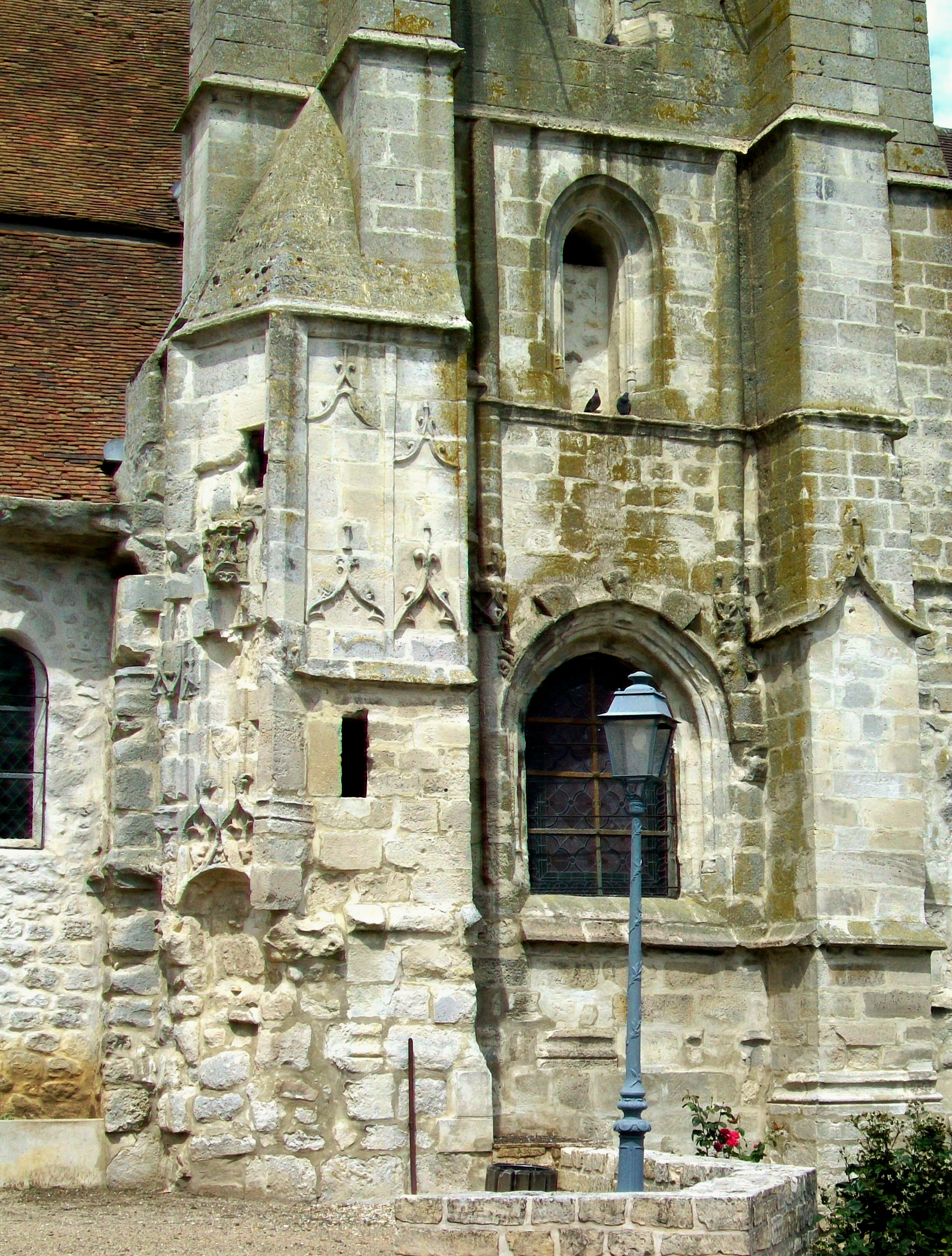 Vestiges de décors flamboyants sur la base du clocher, et d'un petit portail en bas de la tourelle d'escalier.